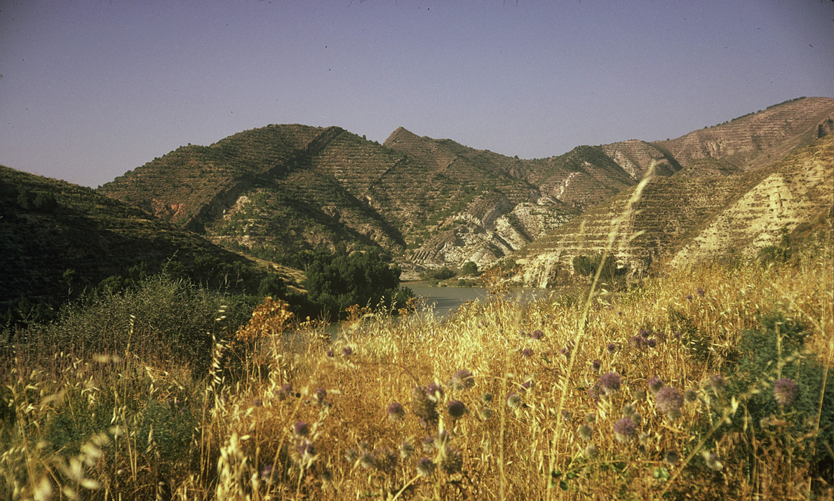 Collines en périphérie du Petit barrage de Sig (8 juin 1974) A noter : le redressement presqu'à la verticale des couches rocheuses.